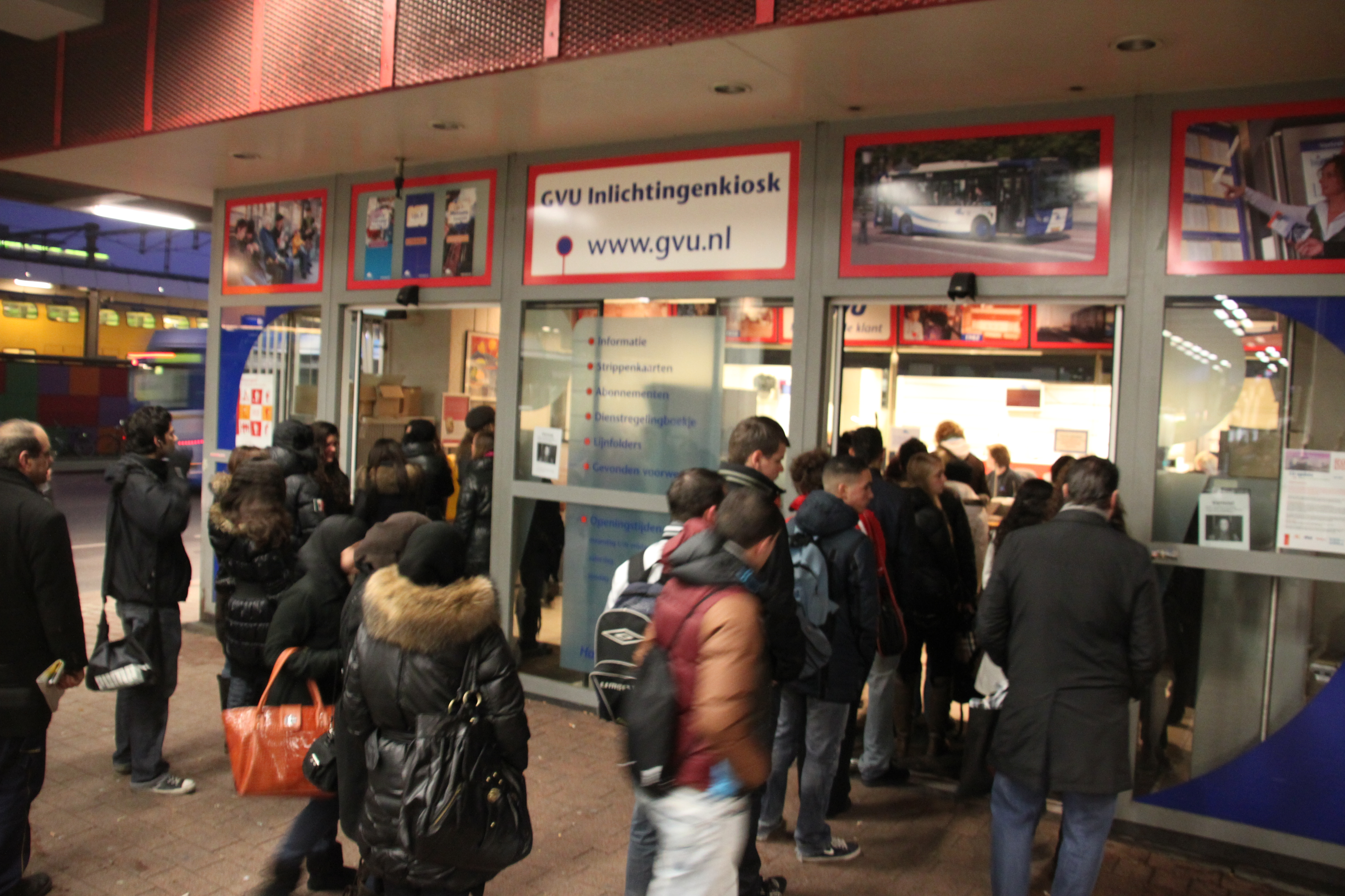 In januari 2010 moesten 600.000 studenten hun reisrecht voor op de OV-chipkaart ophalen. Hierdoor onstonden bij vele verkooppunten lange rijen, zoals hier in Utrecht.